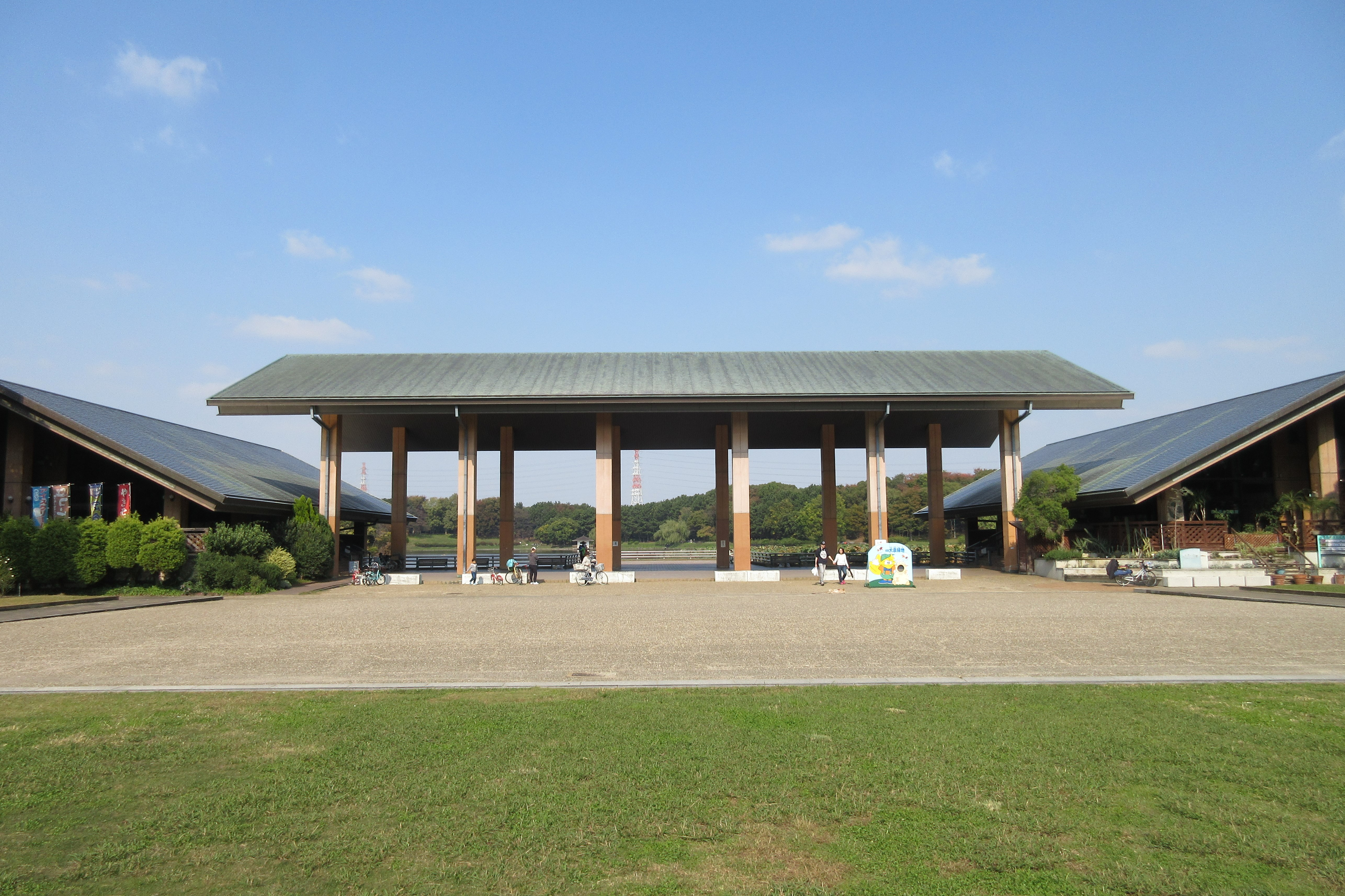 大泉緑地公園